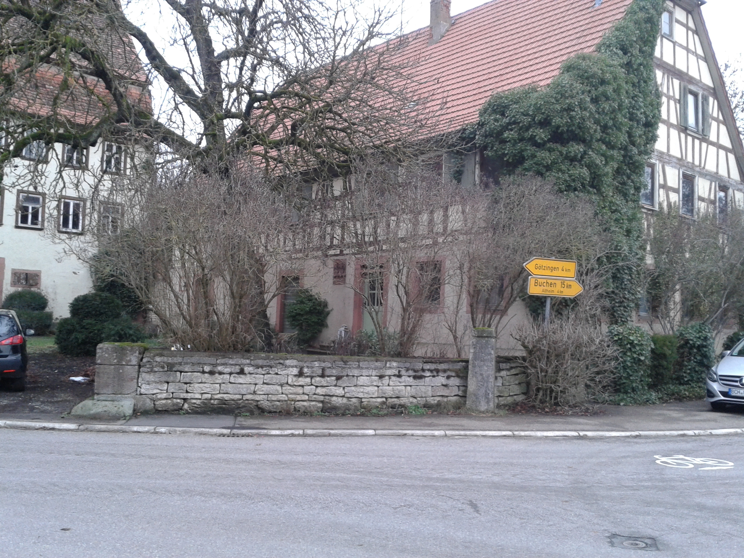 Der Schlossflügel komplettierte die Wohnungen der Schlossbesitzer seit dem 18.Jahrhundert